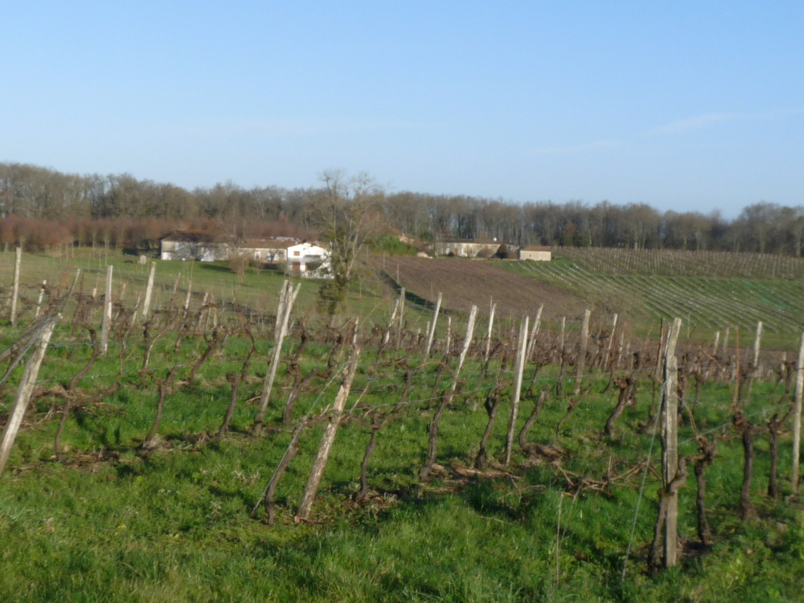 Paysage près d'Expiremont, Charente-Maritime, France